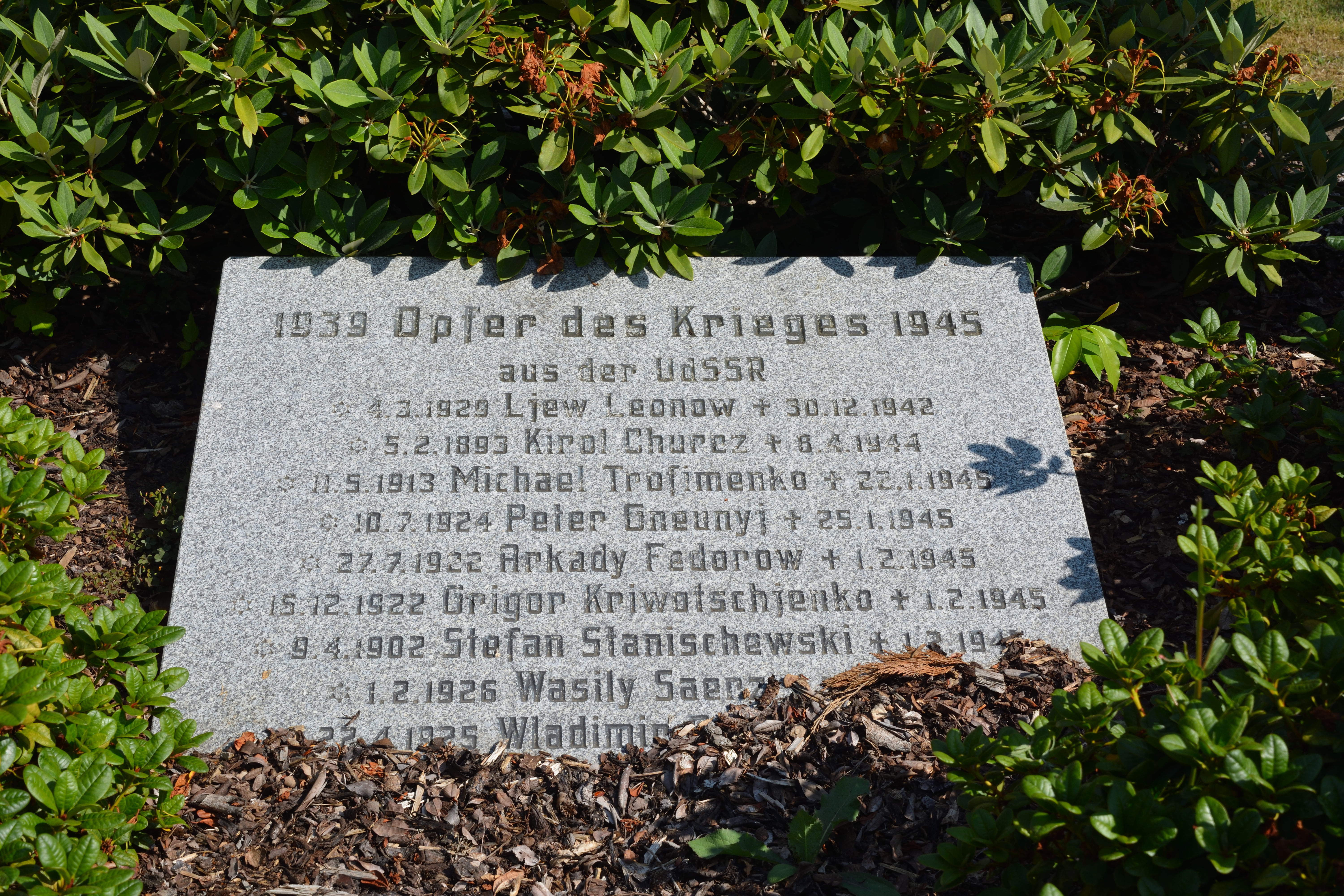 Kriegsgräber auf dem Friedhof von Schacht-Audorf